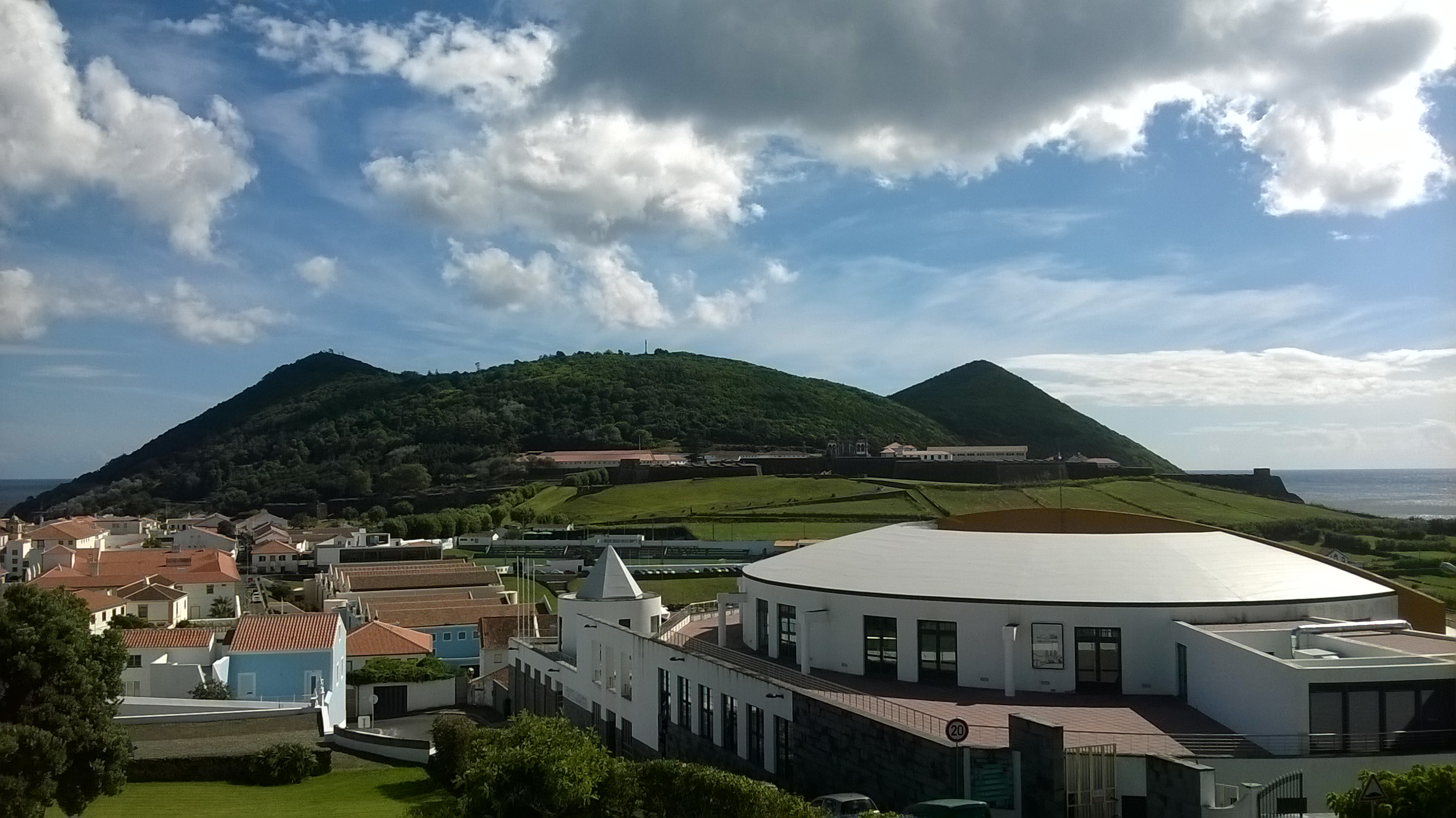 Monte Brasil, freguesia da Sé, concelho de Angra do Heroísmo, ilha Terceira, Região Autónoma dos Açores, Portugal: vista panorâmica a partir de Santa Luzia. Em primeiro plano, o Centro Cultural e de Congressos; em plano intermédio, a Fortaleza de São João Baptista.